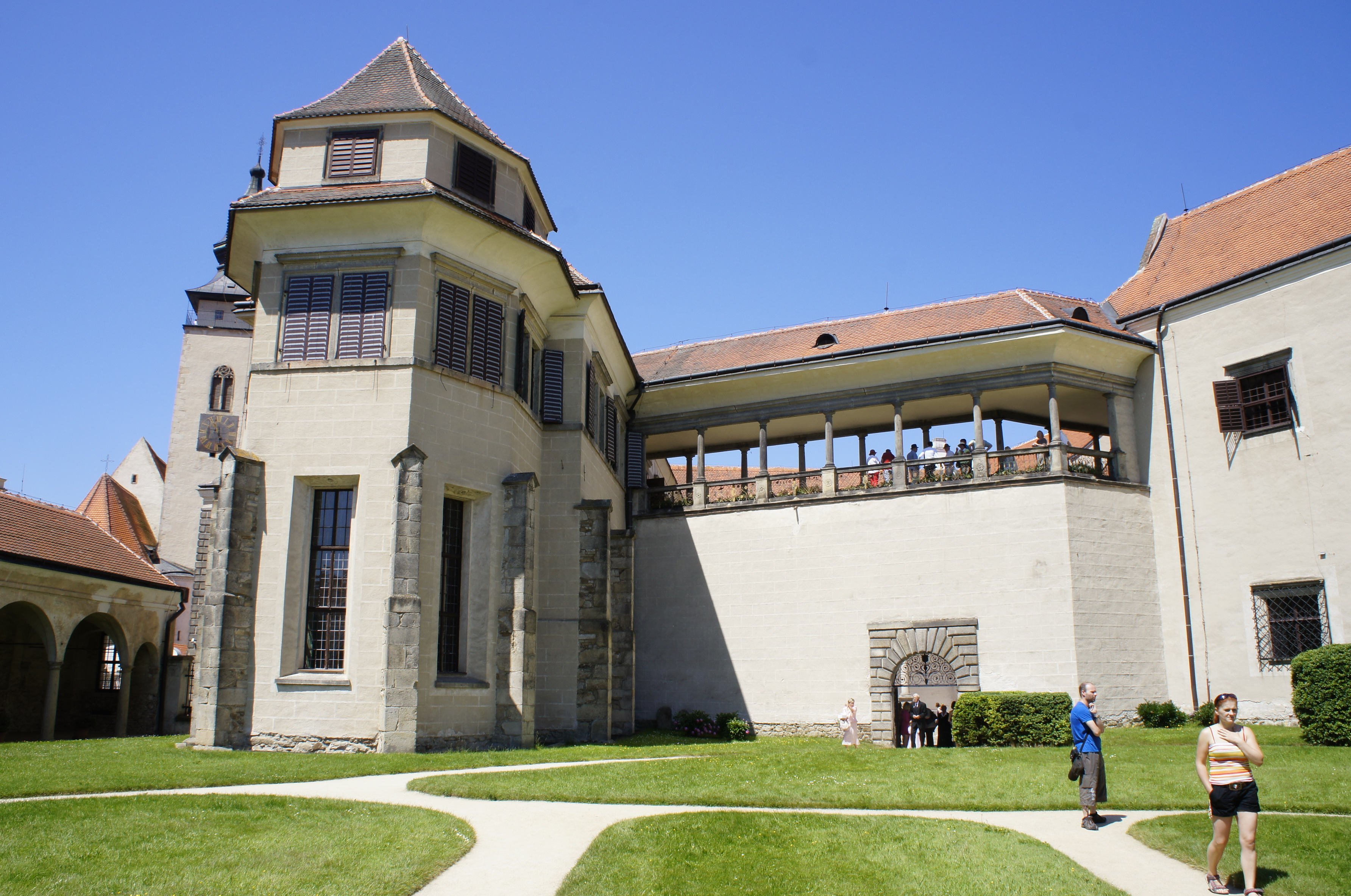 Zámek Telč, nám. Zachariáše z Hradce 1, Telč